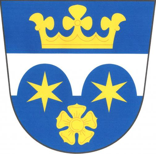 Rodvínov znak